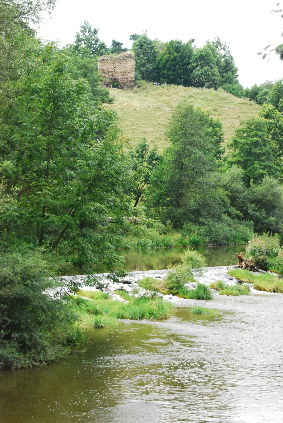 Die Mährische Thaya in Weikertschlag an der Thaya in Niederösterreich.